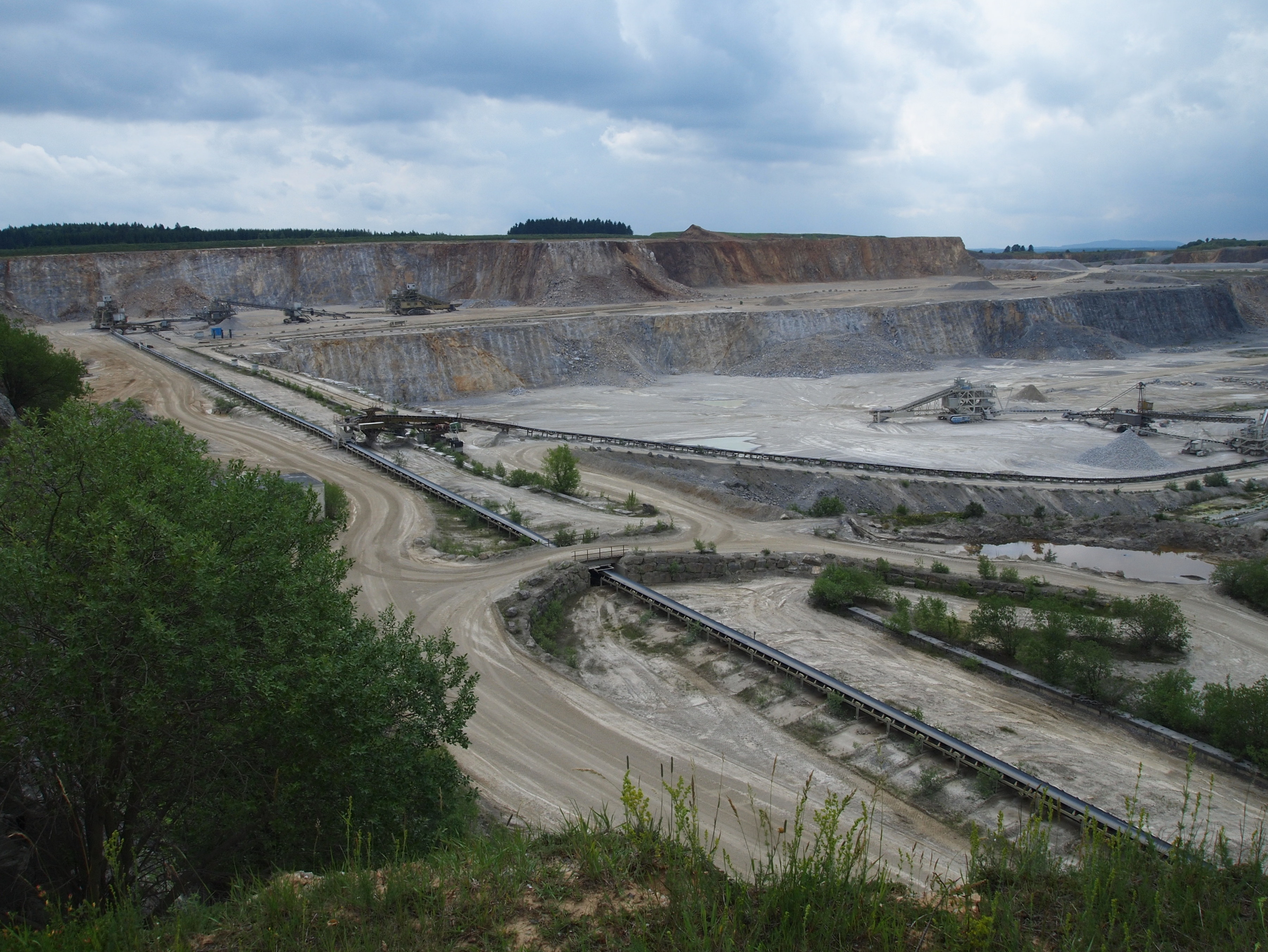 Gelände der Fels-Werke GmbH, Standort: Rübeland/Elbingerode, Landkreis Harz, Sachsen-Anhalt